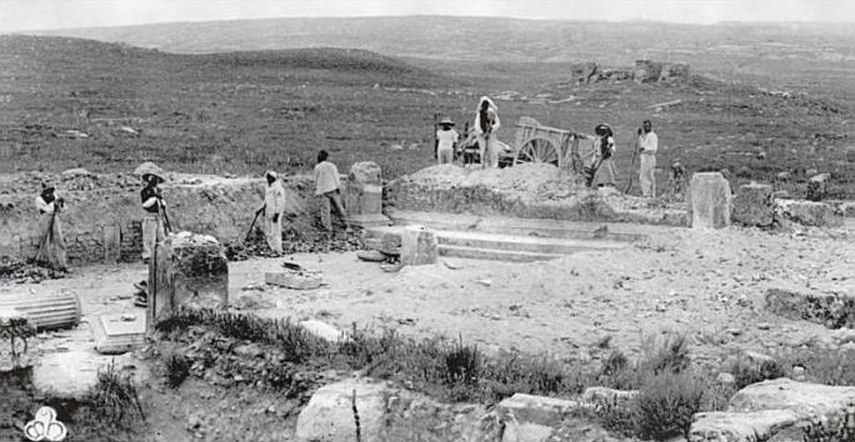 Chantier de fouilles de Timgad vers 1893